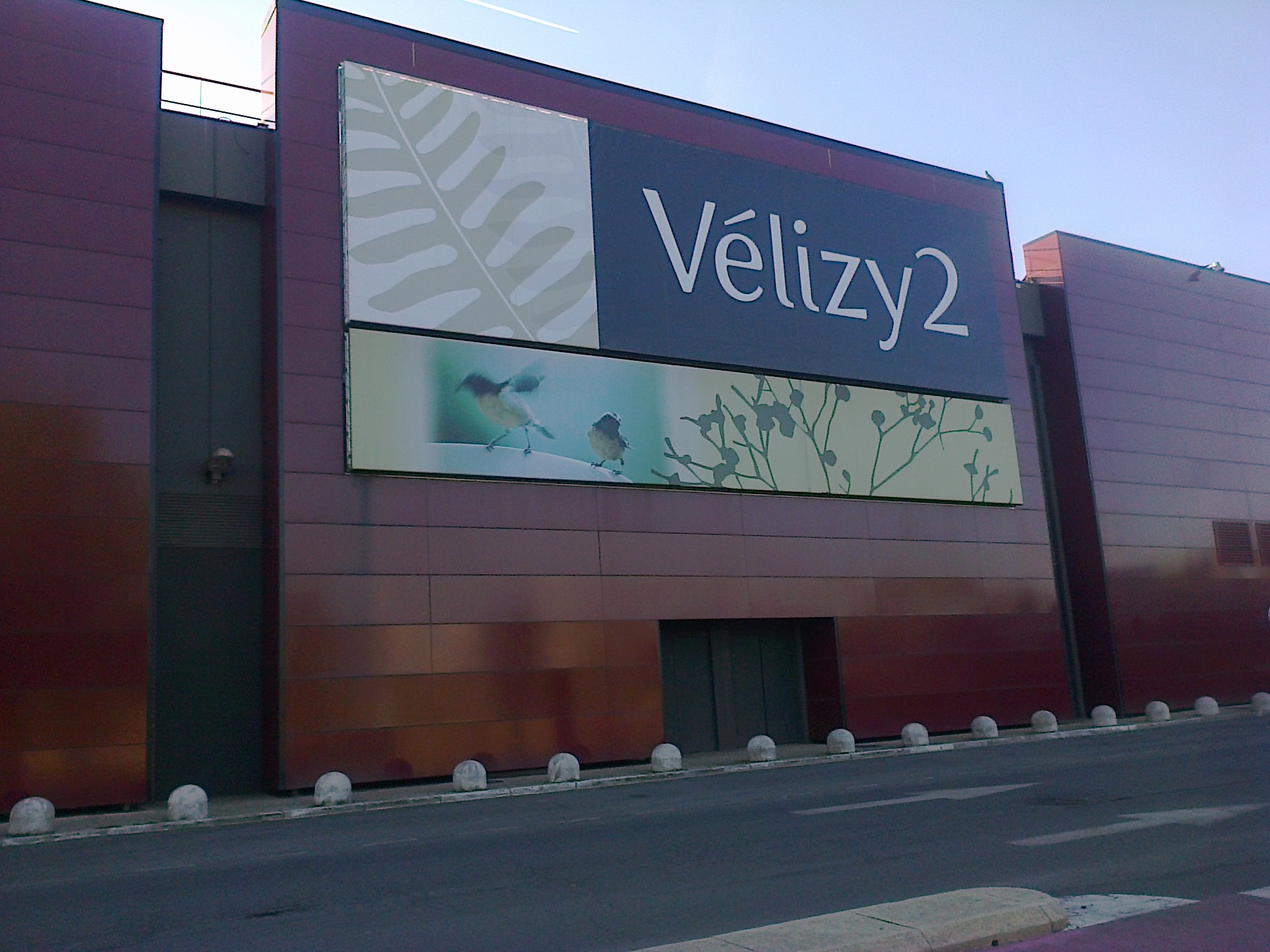 Façade du centre commercial Vélizy 2